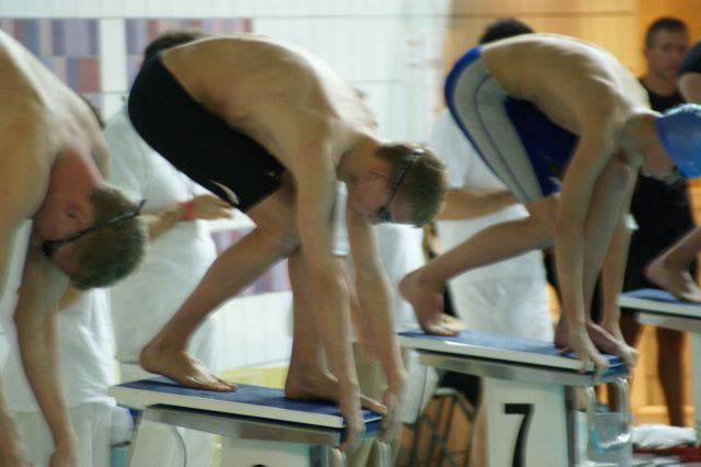 Swemmers maak gereed om in te duik.